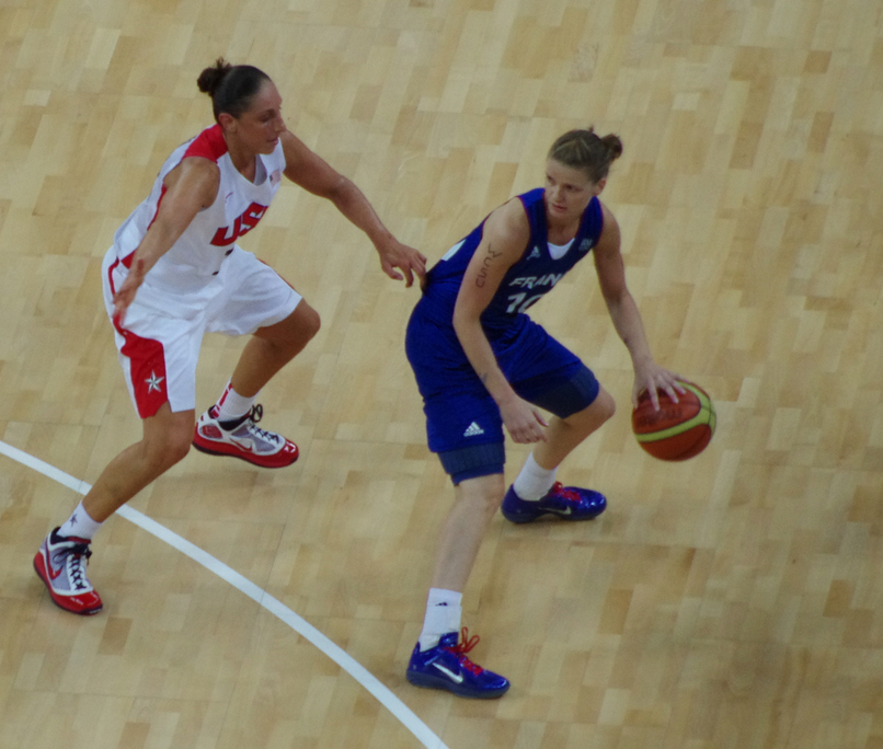 La basketteuse française Florence Lepron (balle en main) face à l'américaine Diana Taurasi lors de la finale olympique 2012.